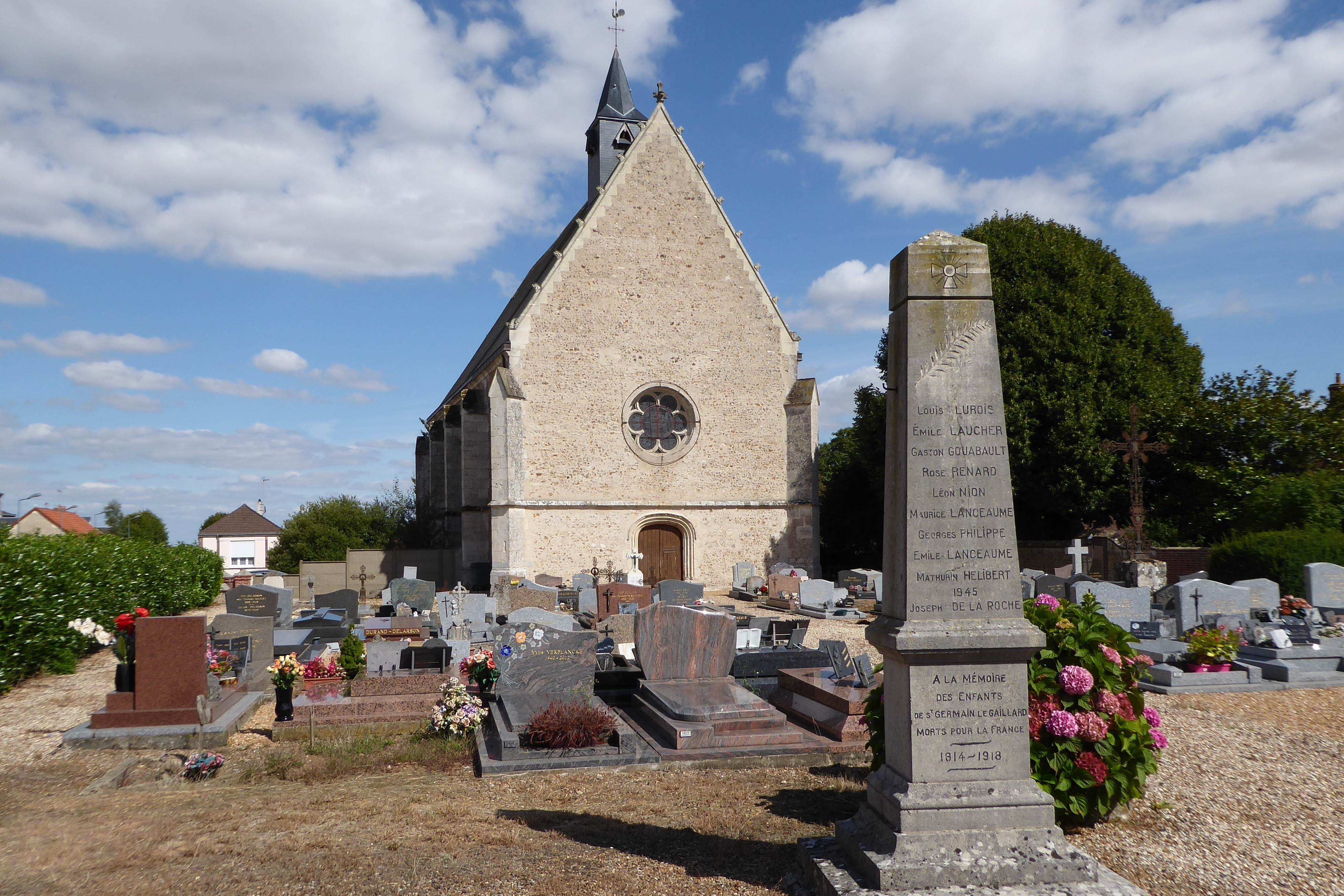 le monument aux morts et l'église Saint-Germain, Saint-Germain-le-Gaillard, Eure-et-Loir (France).